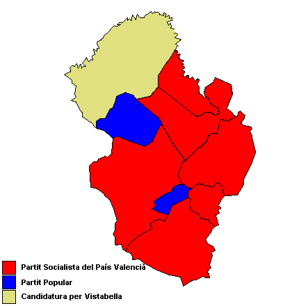 Partits polítics més votats als municipis de l'Alcalatén (País Valencià) després de les eleccions municipals de 2007.